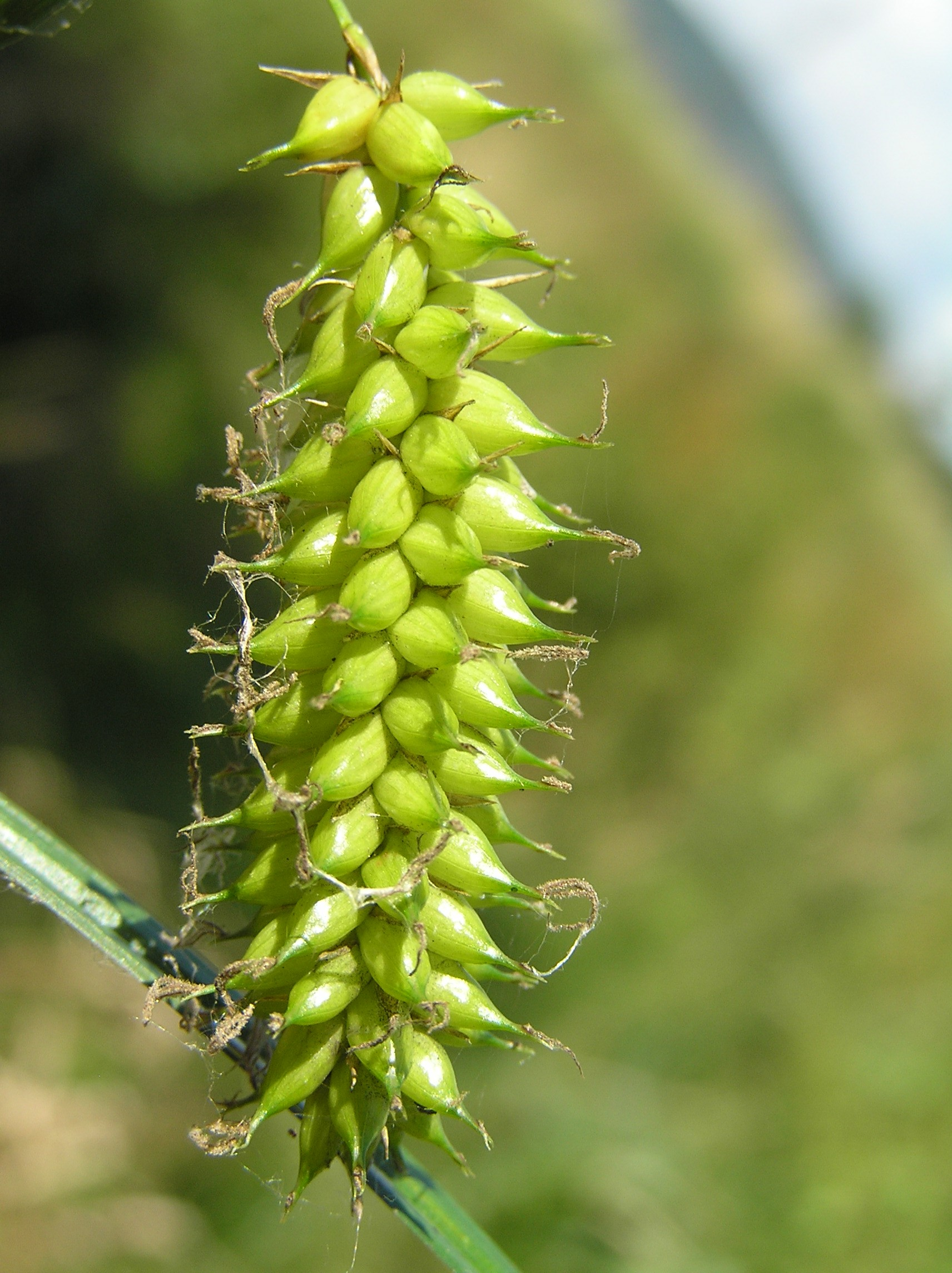 Carex vesicaria, Jezernice, Moravia, Czech Republic